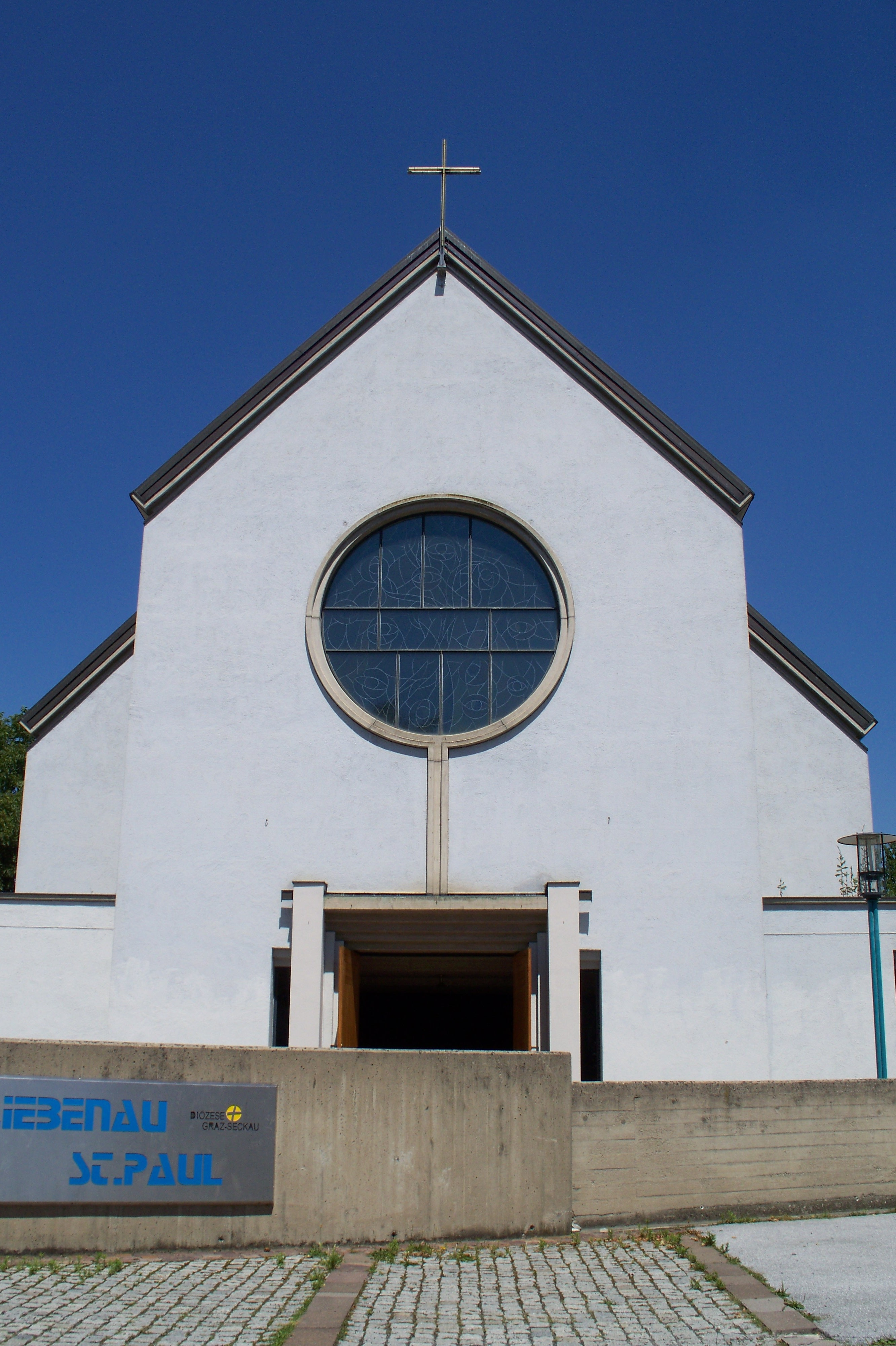 Graz St.Paul (2010)